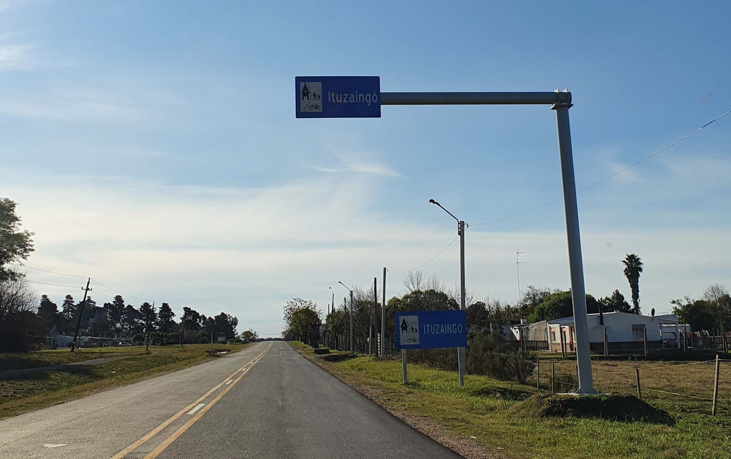 Ruta 79 en Ituzaingó, Uruguay